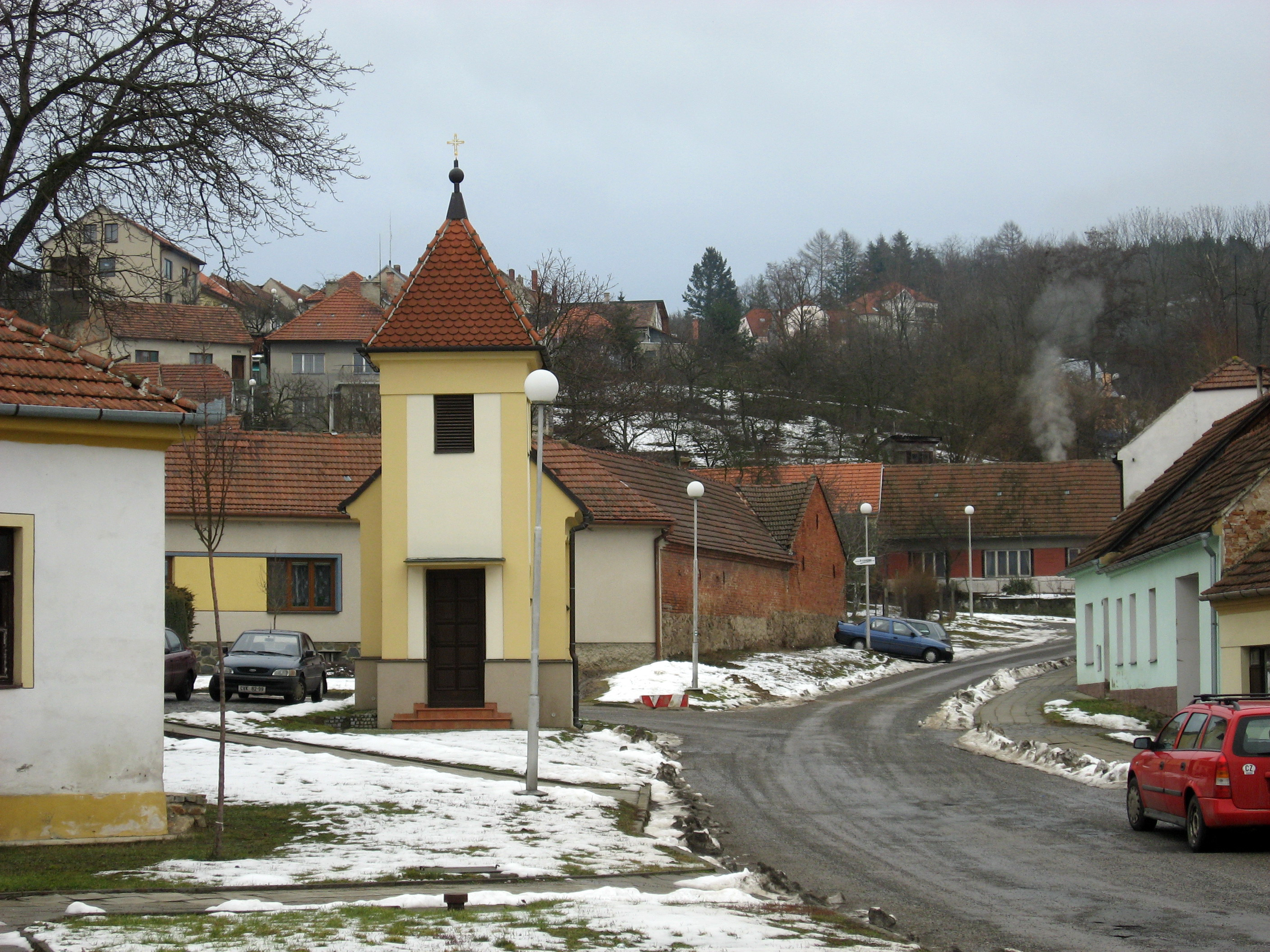 Jinačovice, kaplička